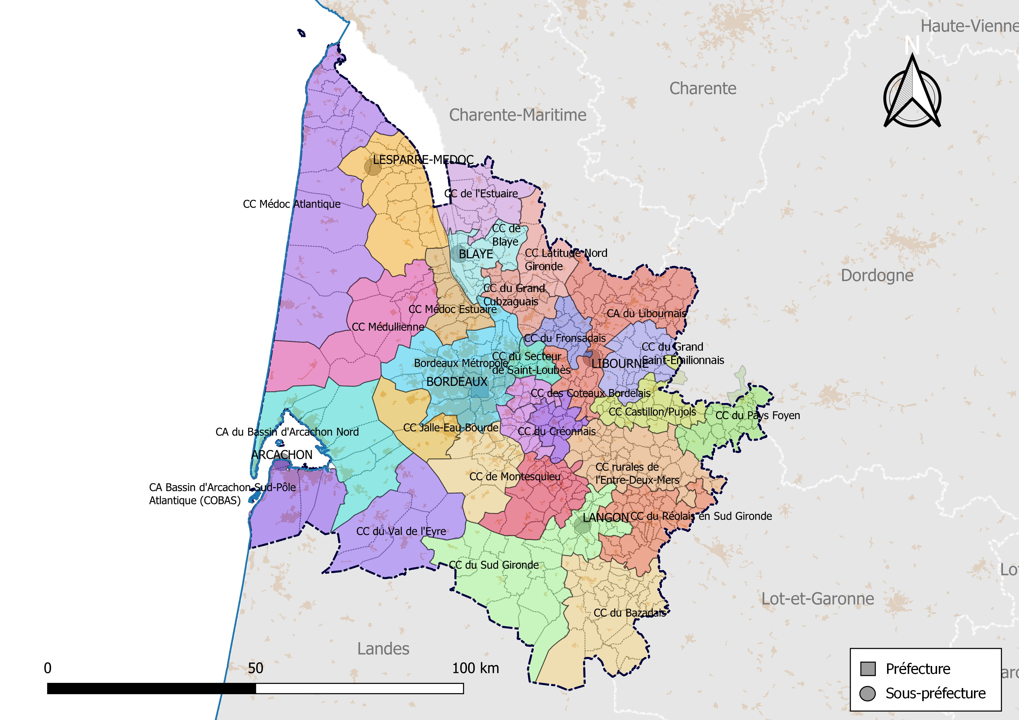 Carte des intercommunalités du département de la Gironde, France. Composition au 1er janvier 2019.